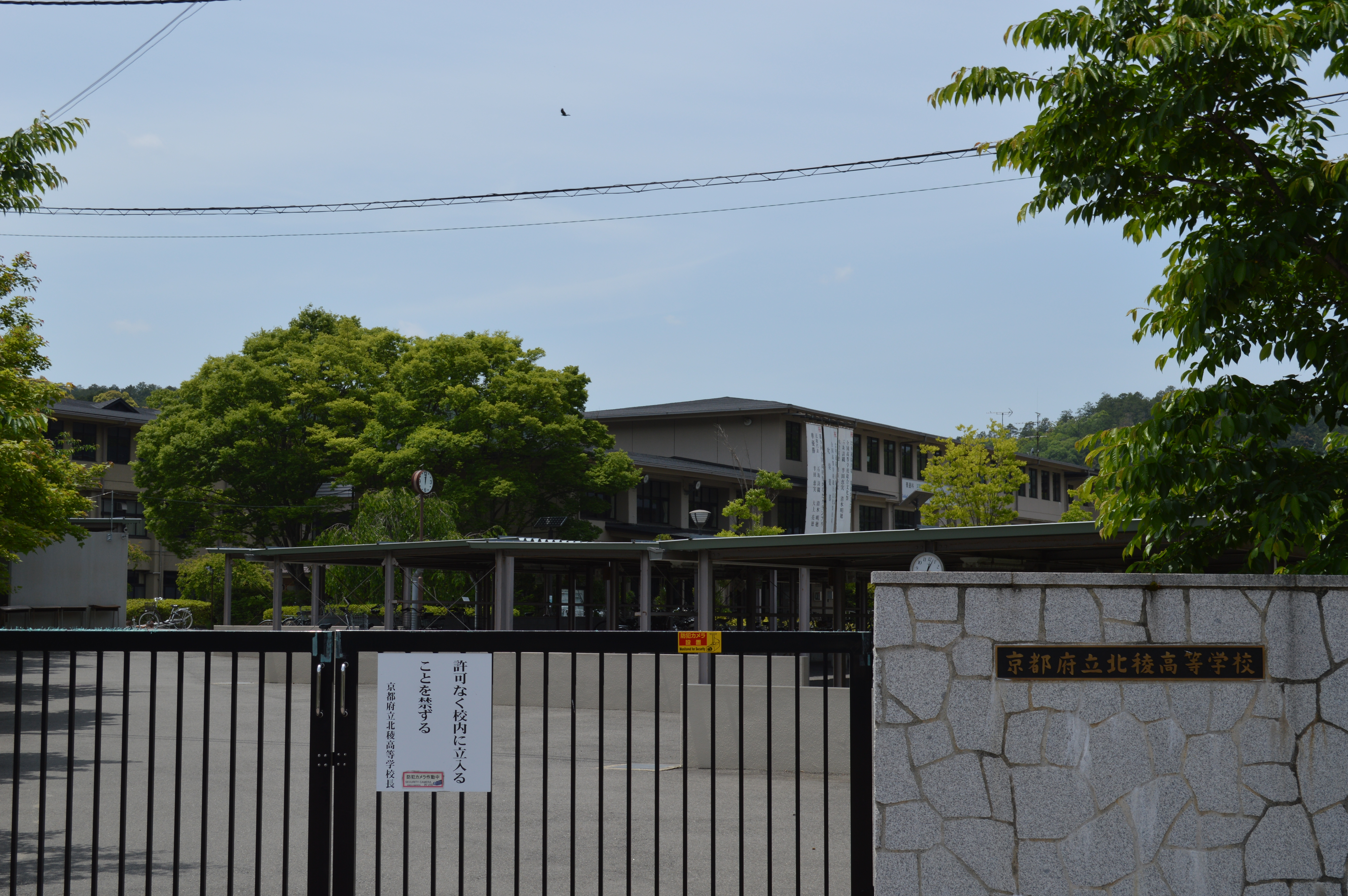 京都市左京区岩倉 京都府立北稜高等学校